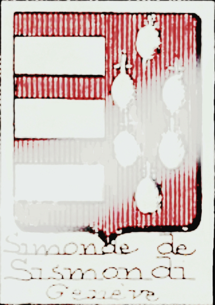 Wappen Simonde de Sismondi (Simonde von Sismondi) (Genfer Hugenotten Symond/Simonde aus der Dauphiné, seit 1796/97 angeblich vom Patriziergeschlecht Sismondi zu Pisa abstammend; gleichzeitig auch das Wappen der französischen Simond de Moydier.)